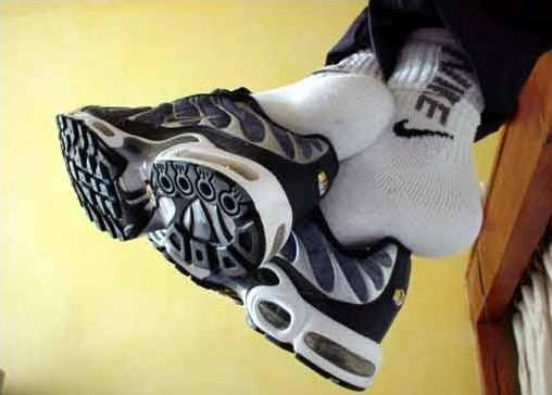 Nike Air Max Plus (Tn)